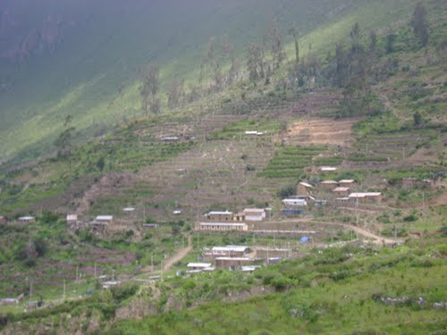 Aguar en epoca de poda